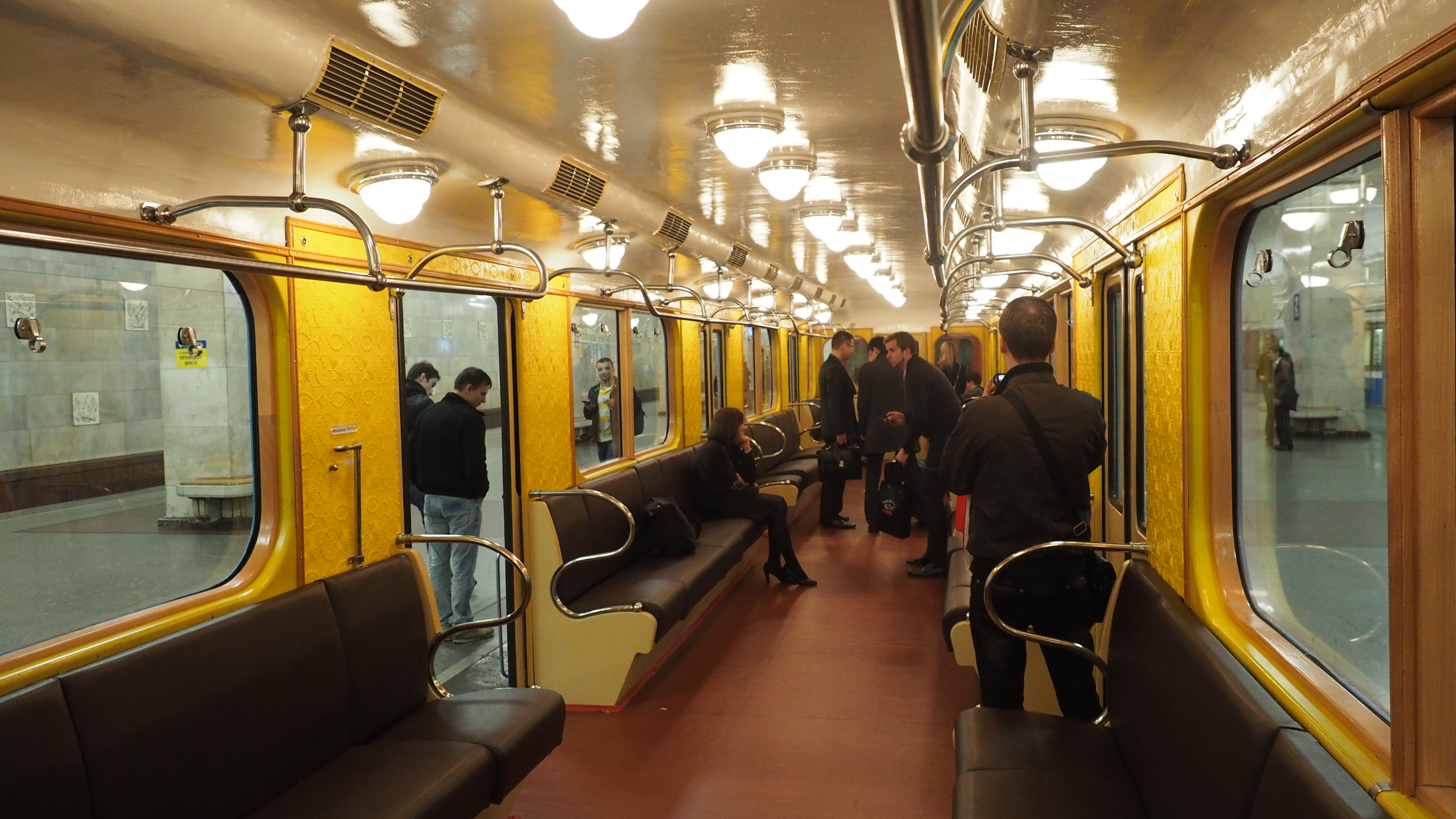 Музейный метровагон А 1031. Выставка подвижного состава и парад поездов к 80-летию Московского метрополитена 15 мая 2015 года. On May 15 and 16, 2015, Moscow Metro celebrated its 80th anniversary. For the first time, recently restored historical cars were exhibited at the siding track of Partizanskaya station. 15 и 16 мая 2015 в Москве отмечалось 80 лет Московскому метро. Впервые была устроена выставка исторических вагонов. Они были расставлены на 3 пути станции Партизанская.